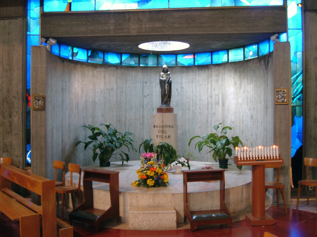 Chiesa del Santo Nome di Maria, a Roma, nel quartiere Appio Latino. Interno: cappella della Madonna.